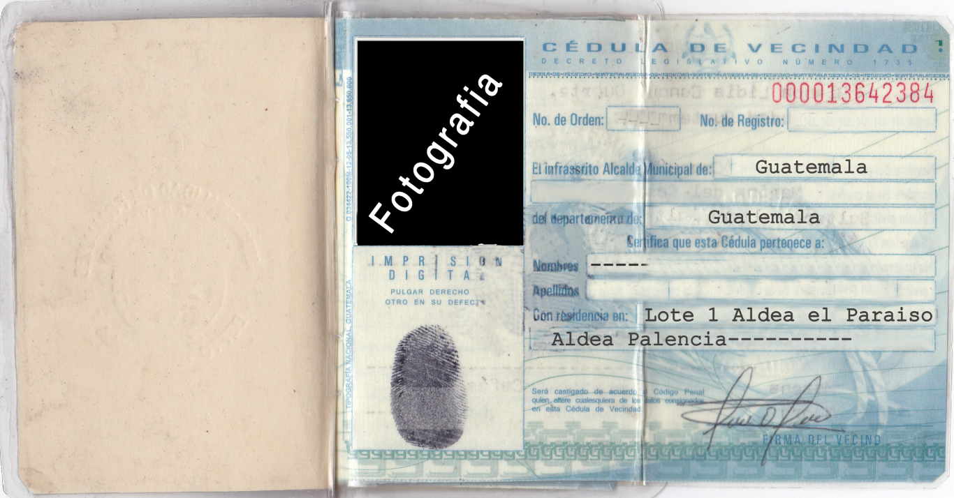 parte de una cedula de vecindad en Guatemala